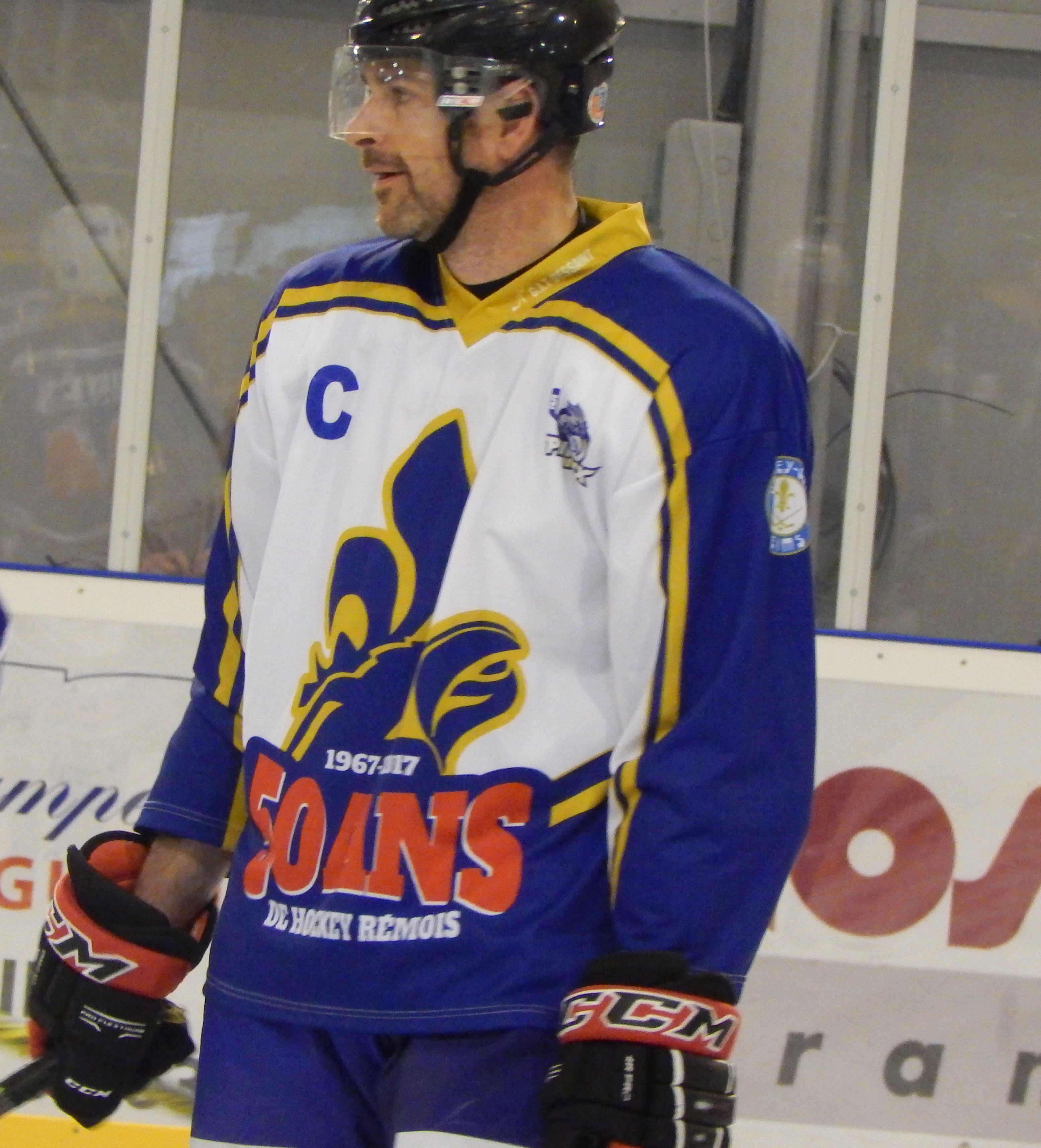 Anthony Mortas capitaine lors du match des 50 ans du hockey Rémois.